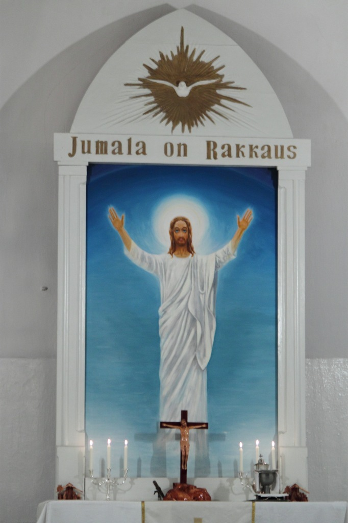 алтарная картина в Пушкинской кирхе